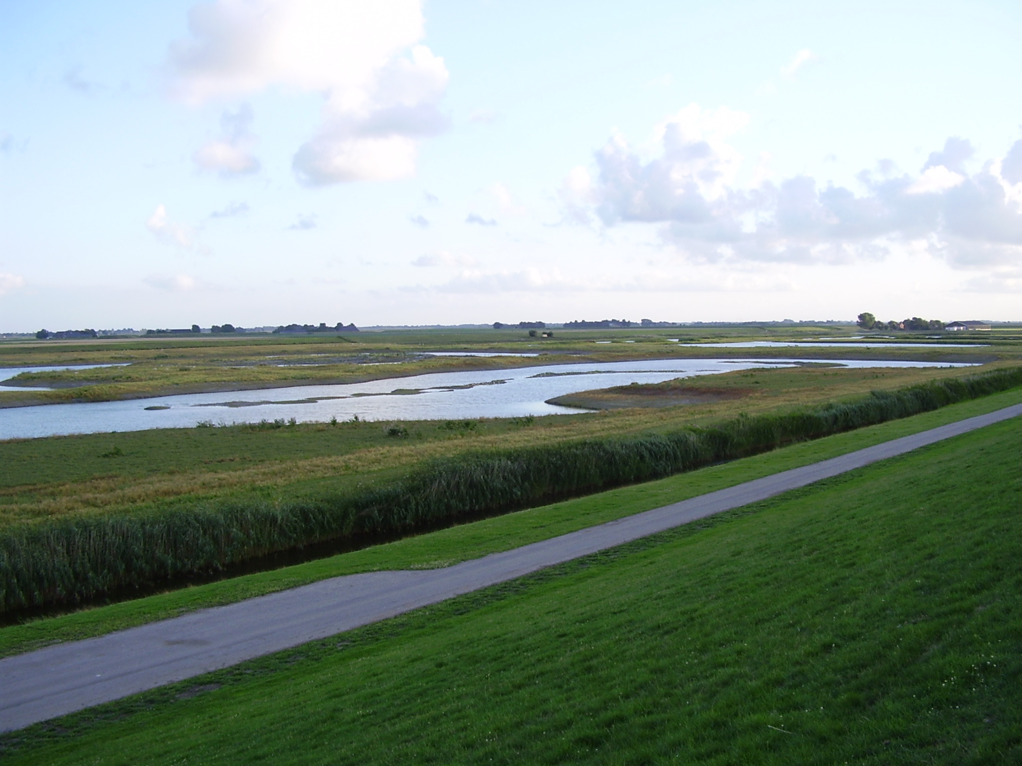 Emmapolder